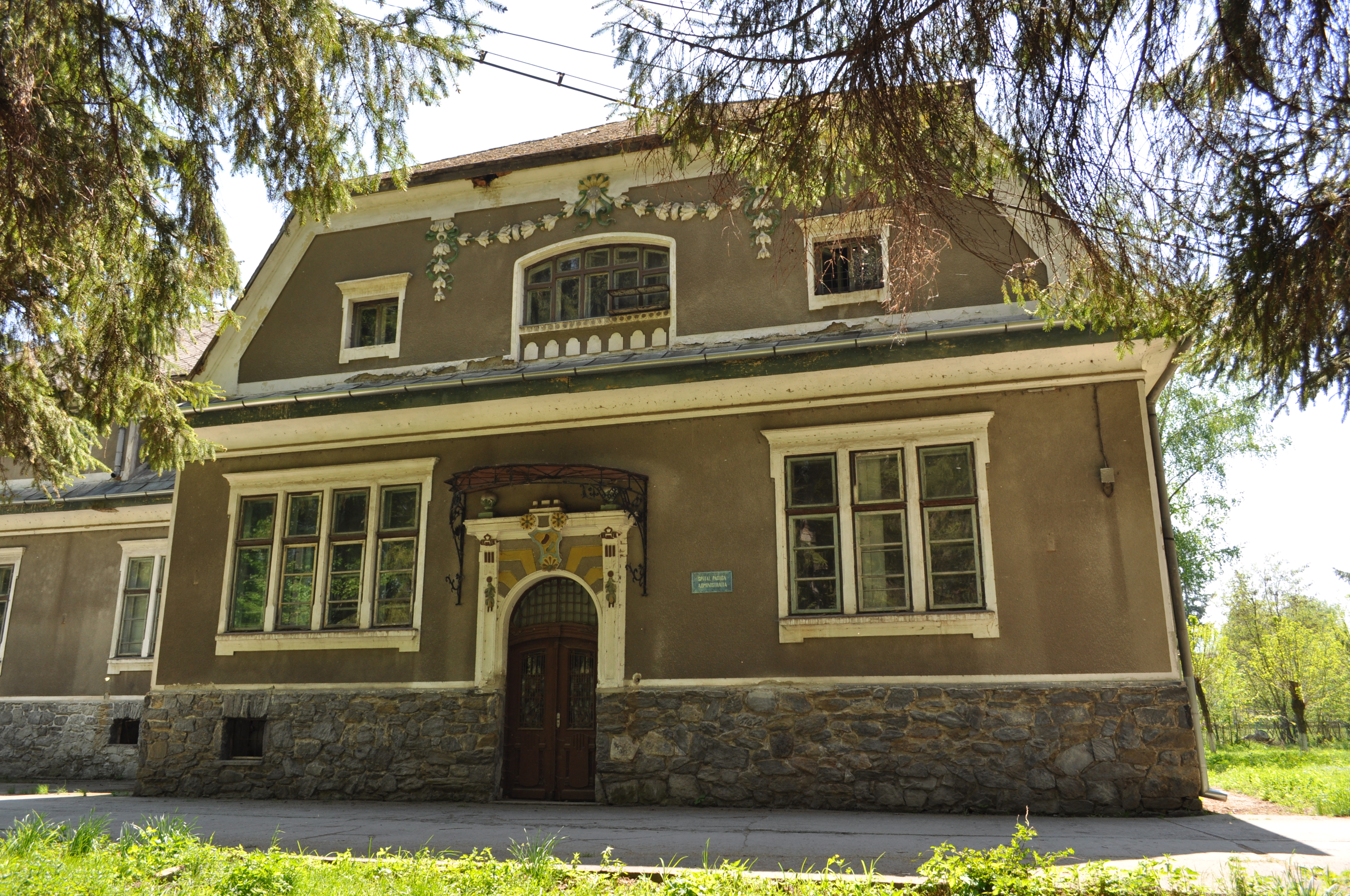 Castelul Pogany din satul PĂCLIŞA; comuna TOTEŞTI 01